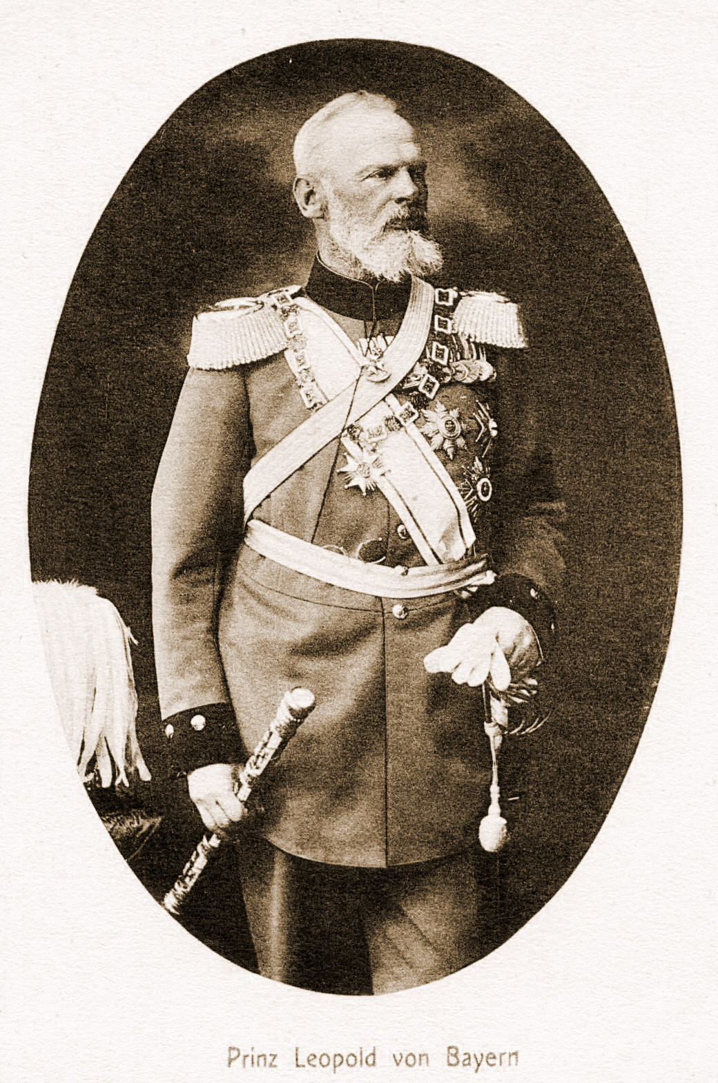 Prinz Leopold von Bayern